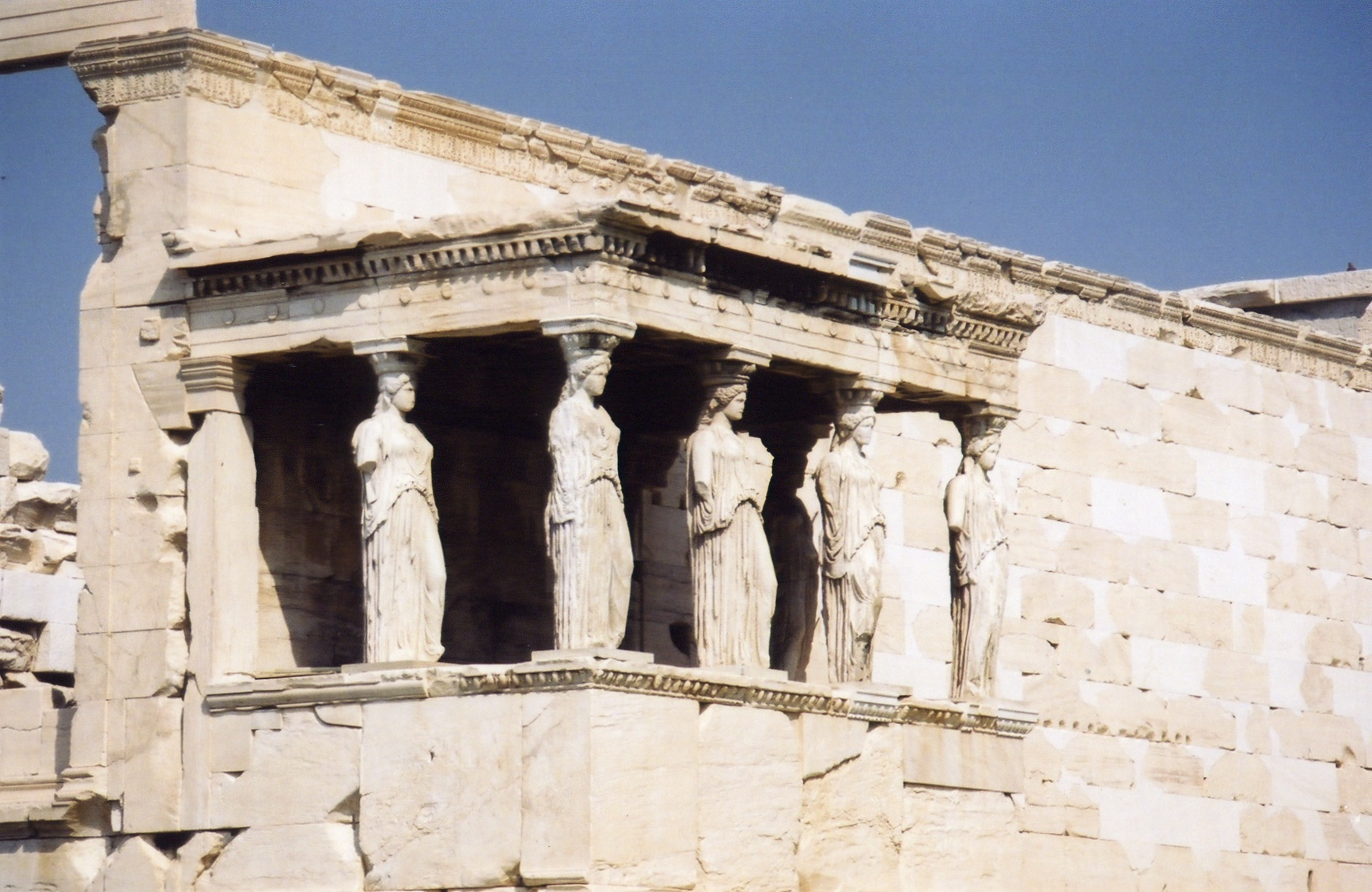 Las Cariátides The Erechtheum at the Acropolis of Athens, Greece